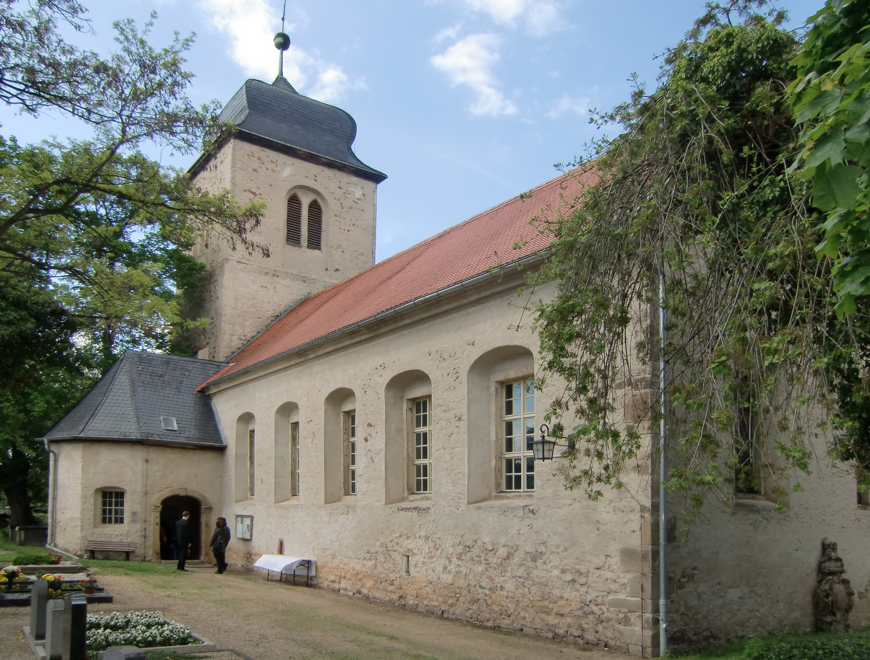 Kirche in Ostrau bei Halle